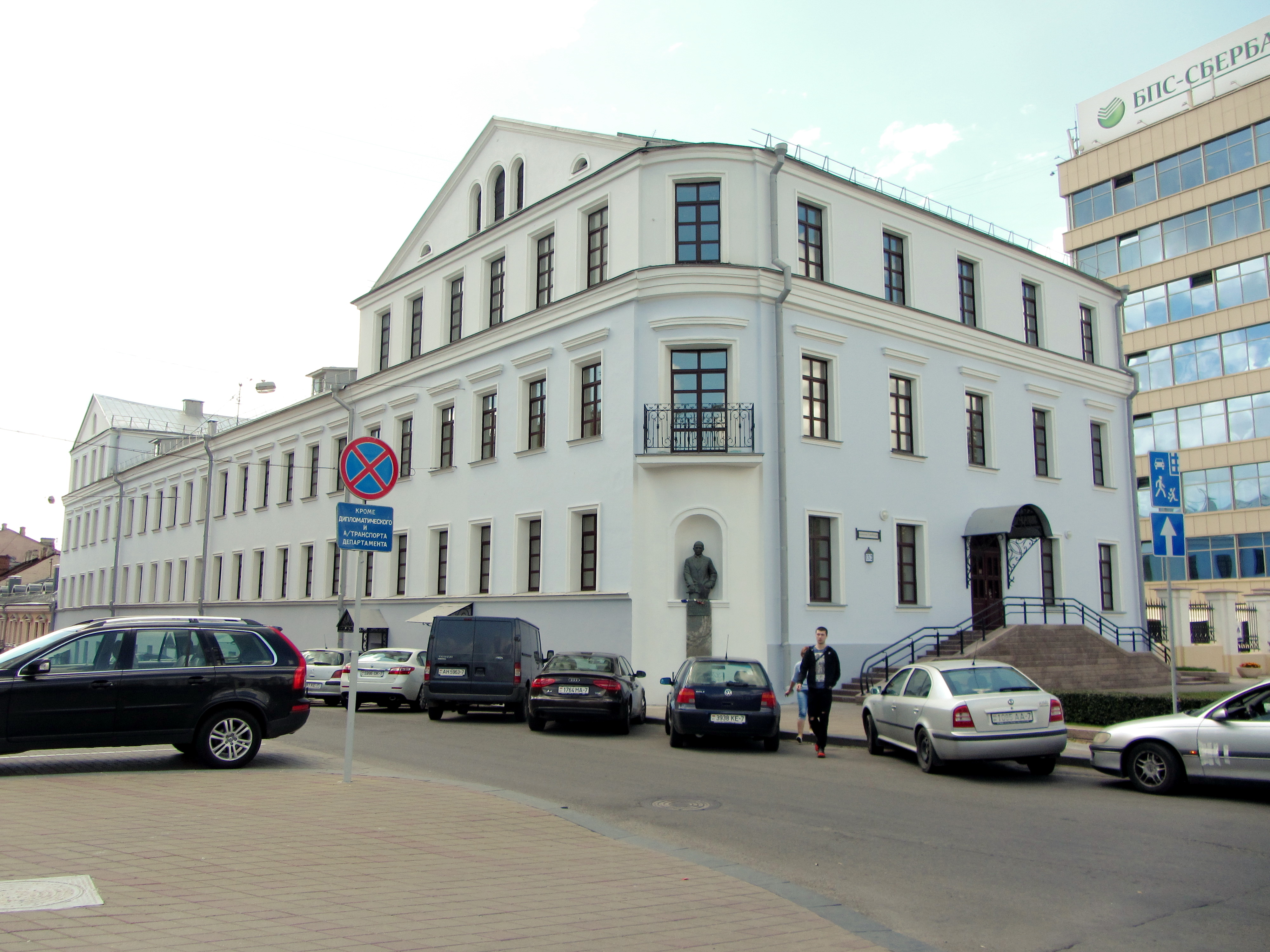 Беларуская (тарашкевіца): Вуліца Рэвалюцыйная, 2. Менск